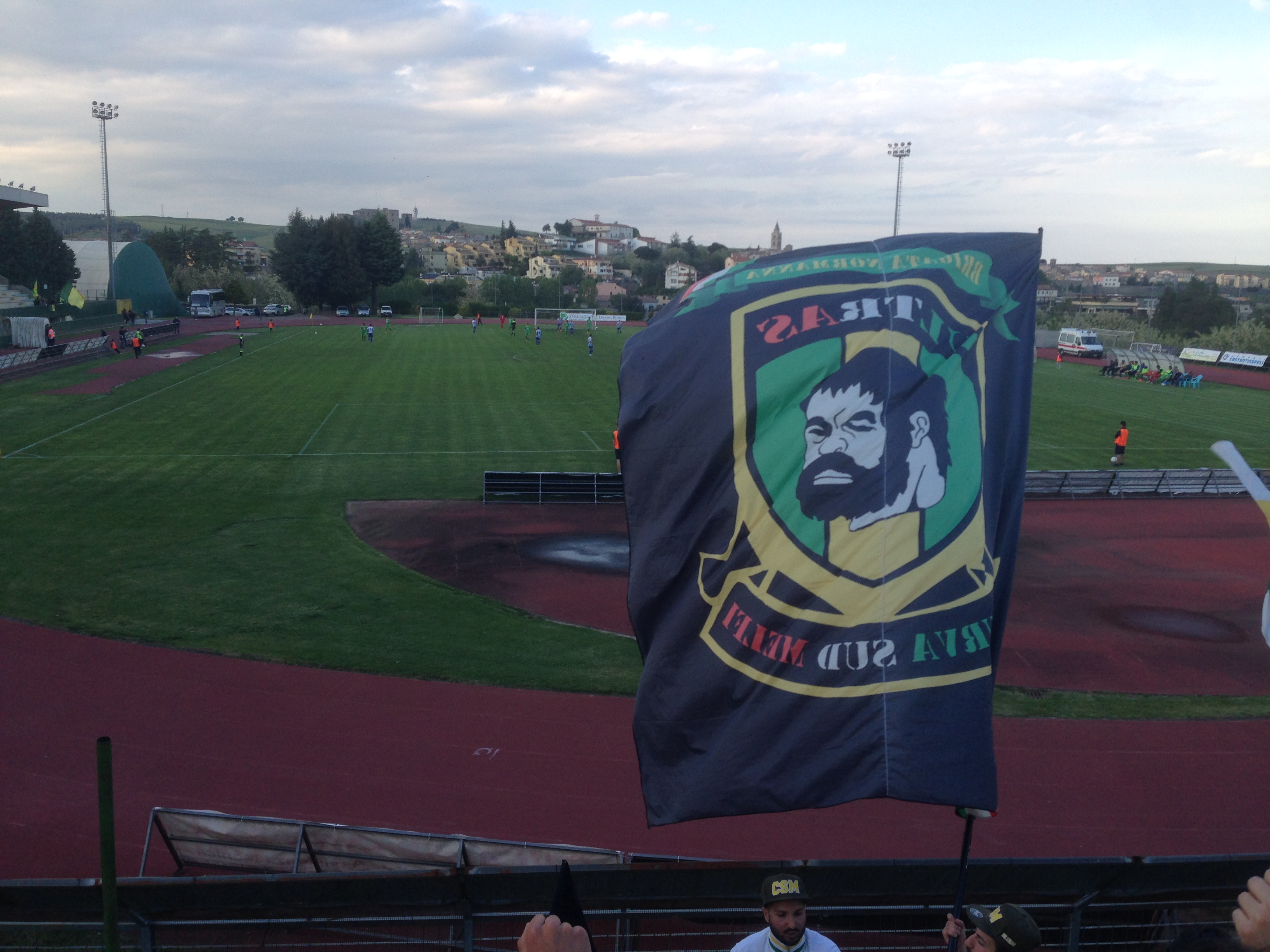 Lo Stadio Arturo Valerio visto dalla Curva Sud